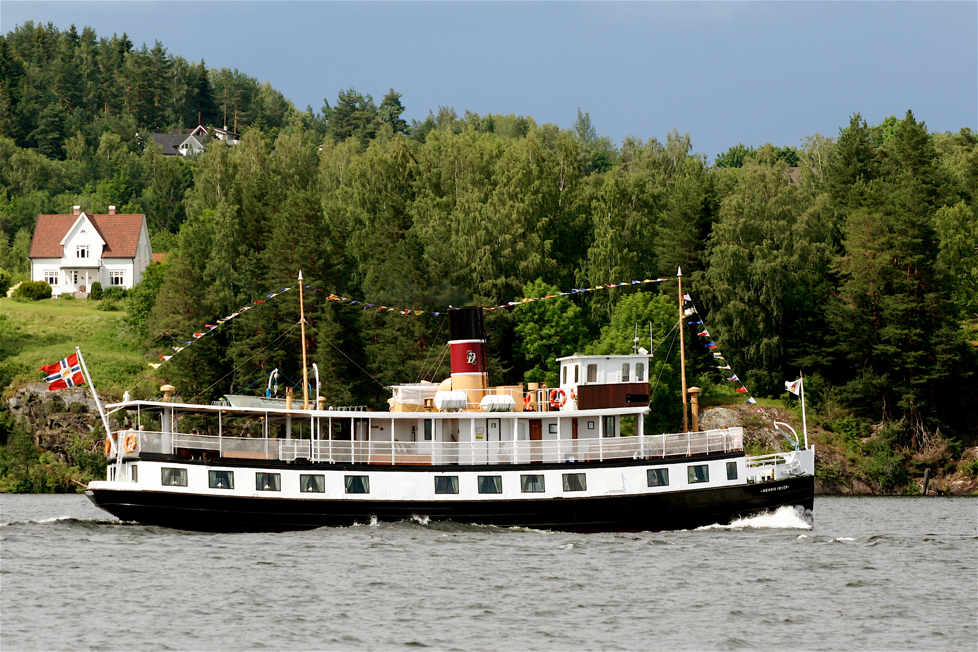 Kanalbåten "Henrik Ibsen" ved Ulefoss IMO Number: 5342673 Callsign: LGBH